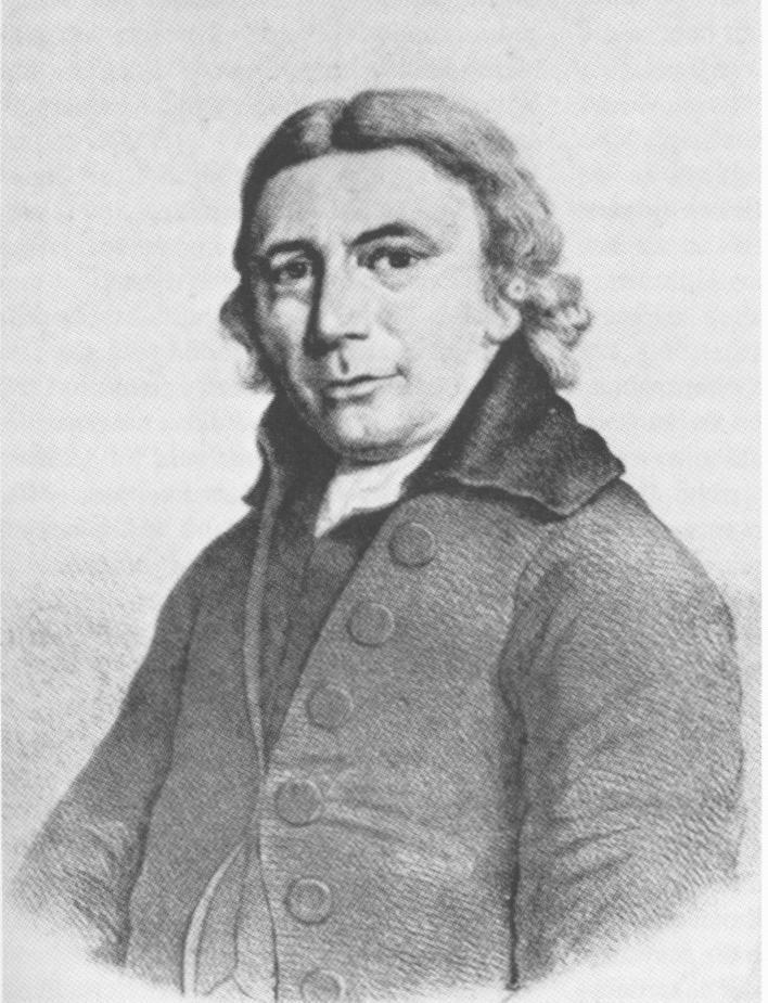 GEERT REINDERS de gelukkige bestrijder der veepest geboren te Bedum den 19e April 1737 en Overleden te Bellingeweer den 4 Feby 1815. Dit is het beeld eens mans Die, in een boeren pij, Een weldoende engel was Voor heel de maatschgappij Begaafd met Franklin's geest Maar wars van hoog te zweven Heeft hij de Veepest uit Den runderstal verdreven Een vraagbaak van 't gemeen Der wijzen regterhand Zijn naam vereeuwigd en Veradeld zijnen stand Zoo 't Vaderland naar eisch Zijn deugden zou betalen, Men zag dan, op zijn graf Een gouden eerzuil pralen